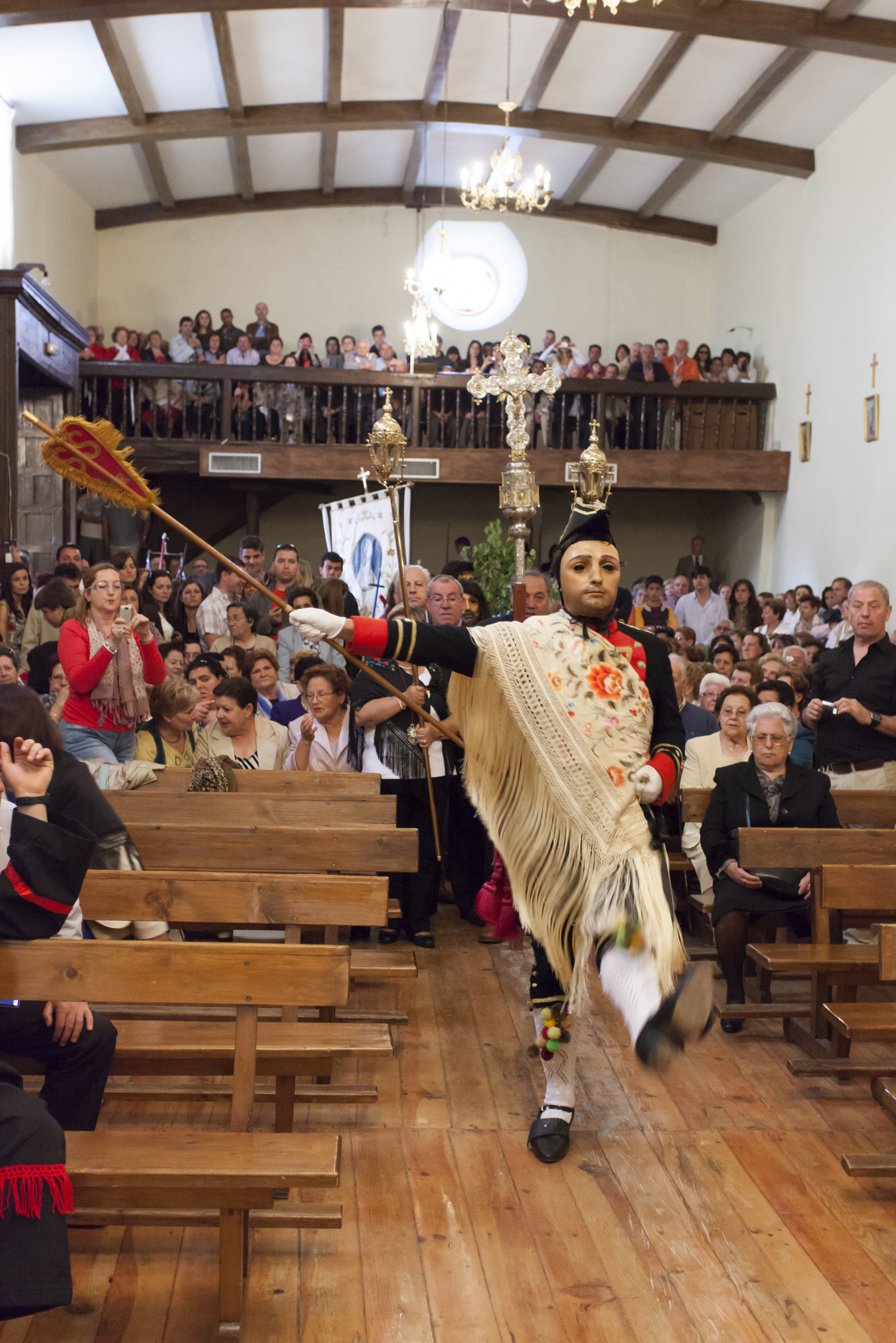 Corpus Christi en Laguna de Negrillos. León, España. Junio 2012. This is a photography of a Folklore festival in Spain (Wikidata id Q17627979).